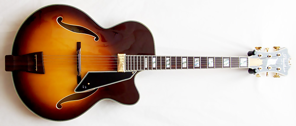 guitare de type "Archtop" Vintage VSA750ATS Brooklyn